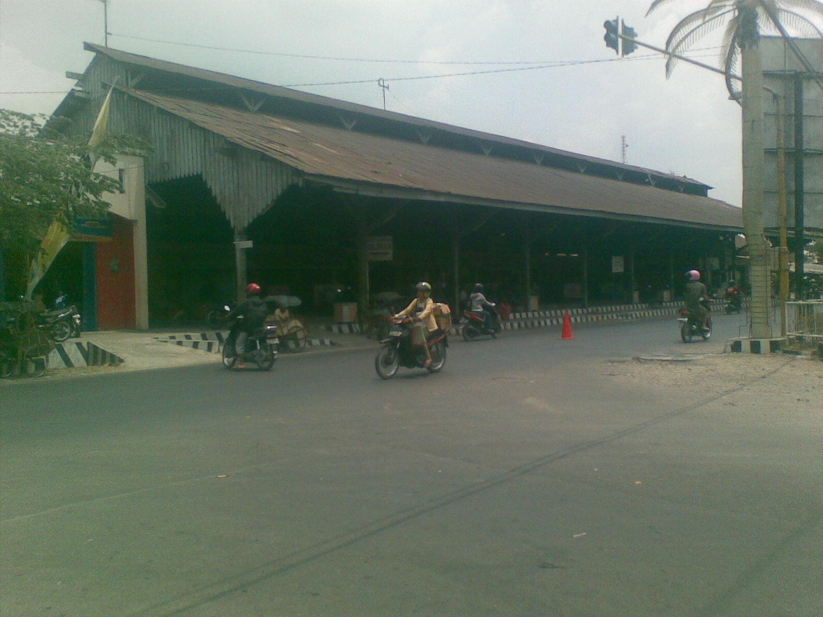 Eks bangunan Stasiun Kereta Api Blora, Blora. Jawa Tengah.